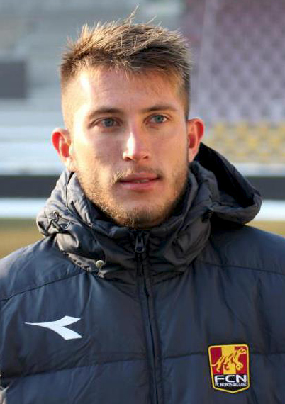 Francisco Calvo cuando jugó para el F.C. Nordsjælland de Dinamarca.